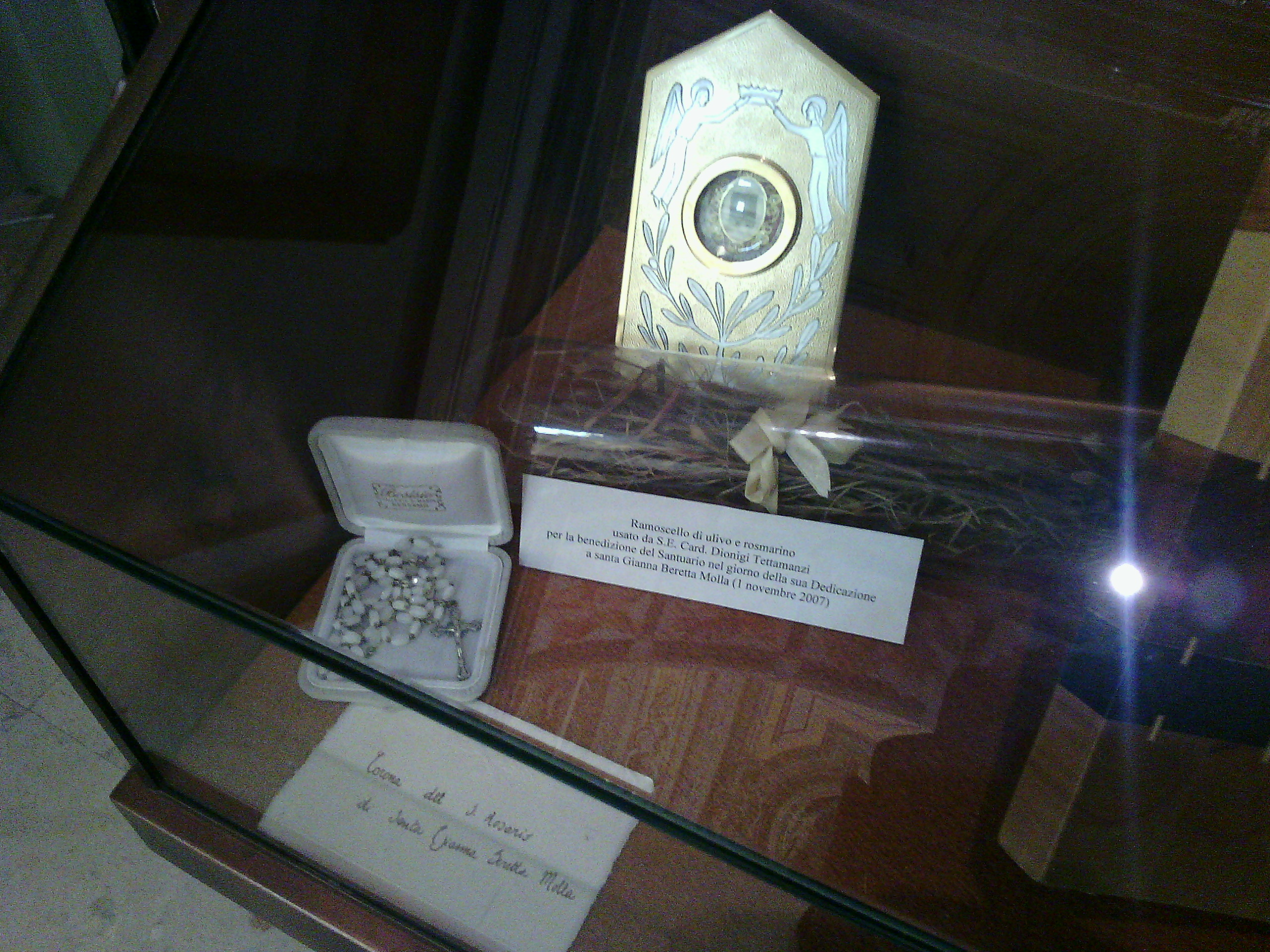 Reliquie di oggetti appartenuti a santa Gianna Beretta Molli conservate nel suo santuario a Mesero (MI) - Italia